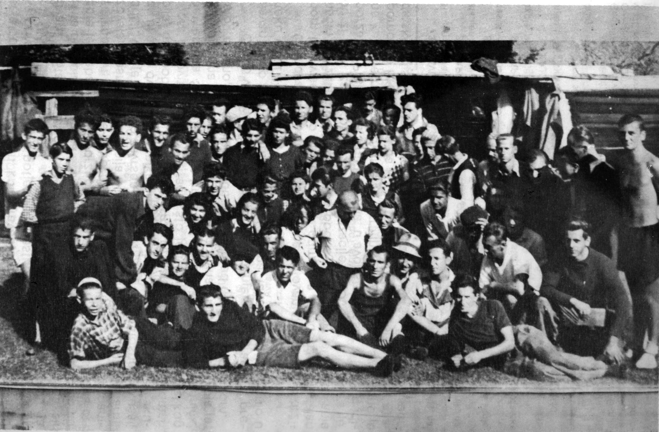 Skupina SKOJ-evaca u Pršljanima u Bugojnu